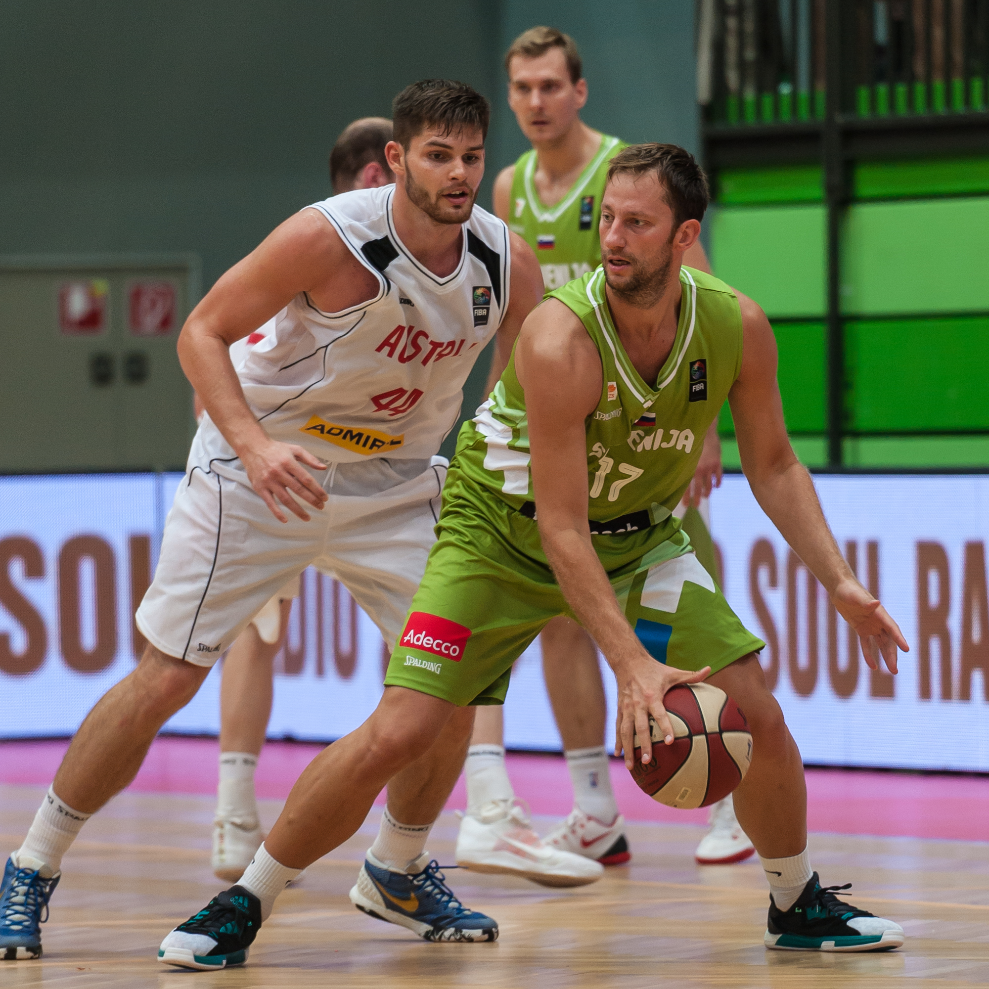 ÖBV Vier-Nationen-Turnier vom 12.-14. August 2016 in Schwechat: Österreich vs Slowenien. Bild zeigt Filip Kraemer (AUT) und Sasa Zagorac (SLO).